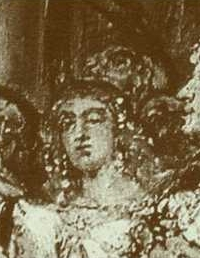 Bezprym (fragment obrazu Koronacja pierwszego króla)